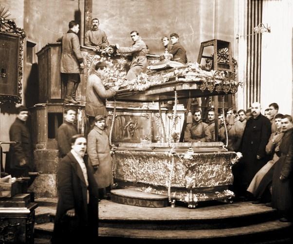 Вскрытие раки с мощами святого благоверного князя Александра Невского. 1922. Фотограф В.К.Булла. Др-1126